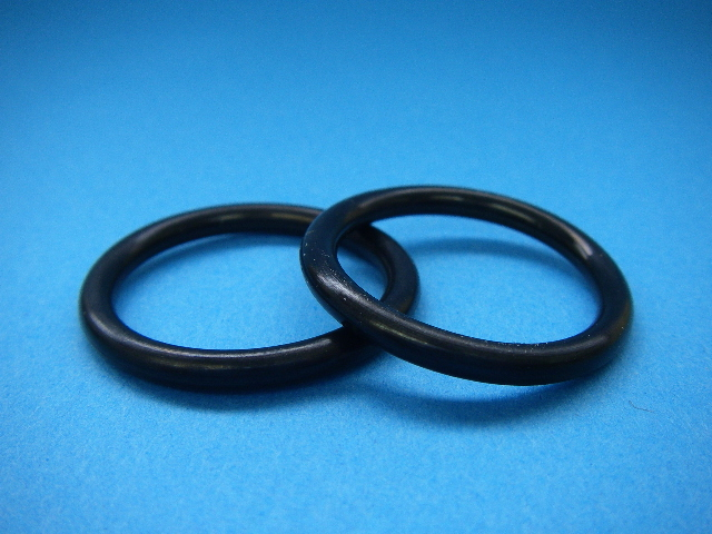 Oring